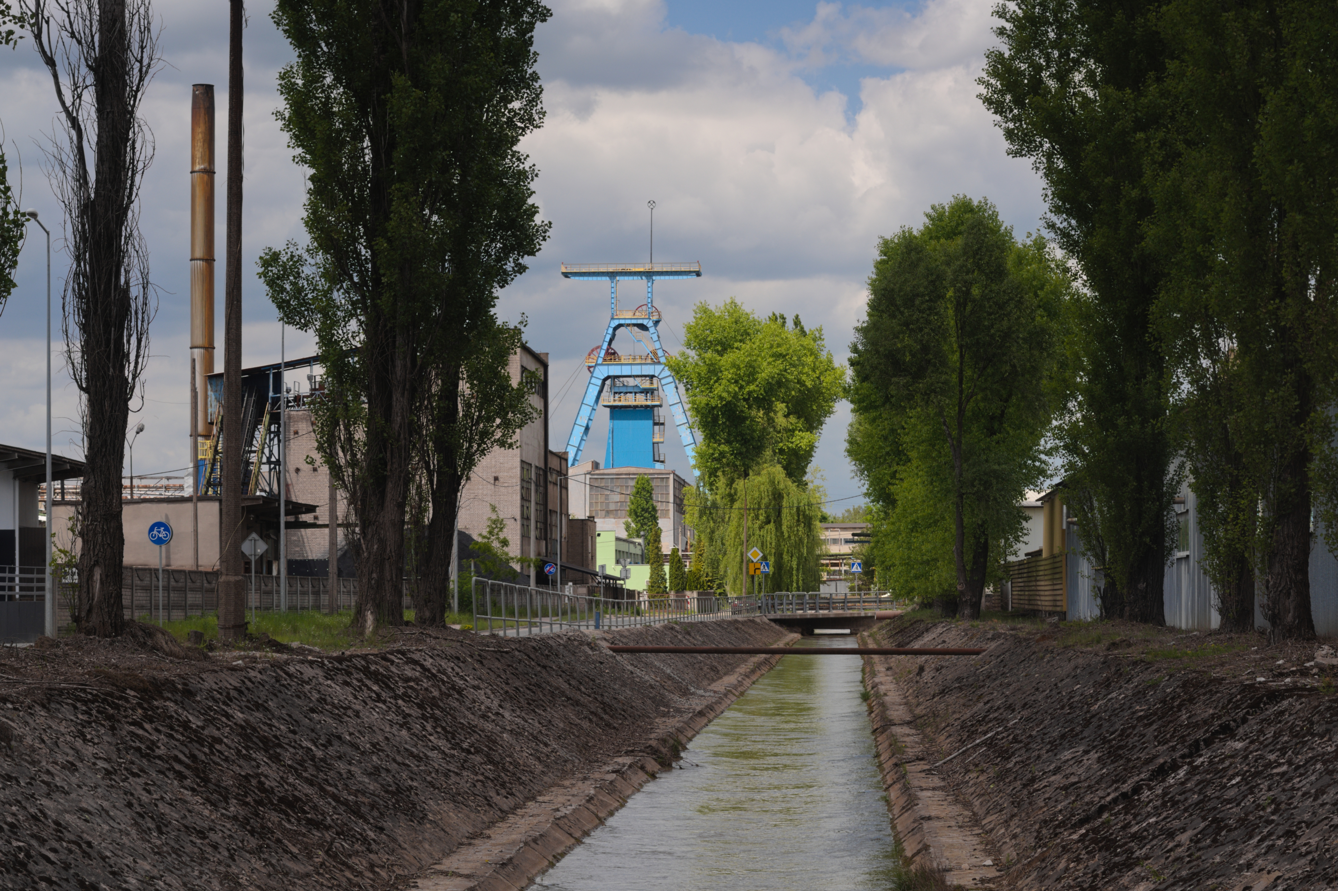 wieża wyciągowa szybu Chrobry kopalni Olkusz-Pomorzany rejon Olkusz, widok z ulicy Wspónej w Olkuszu